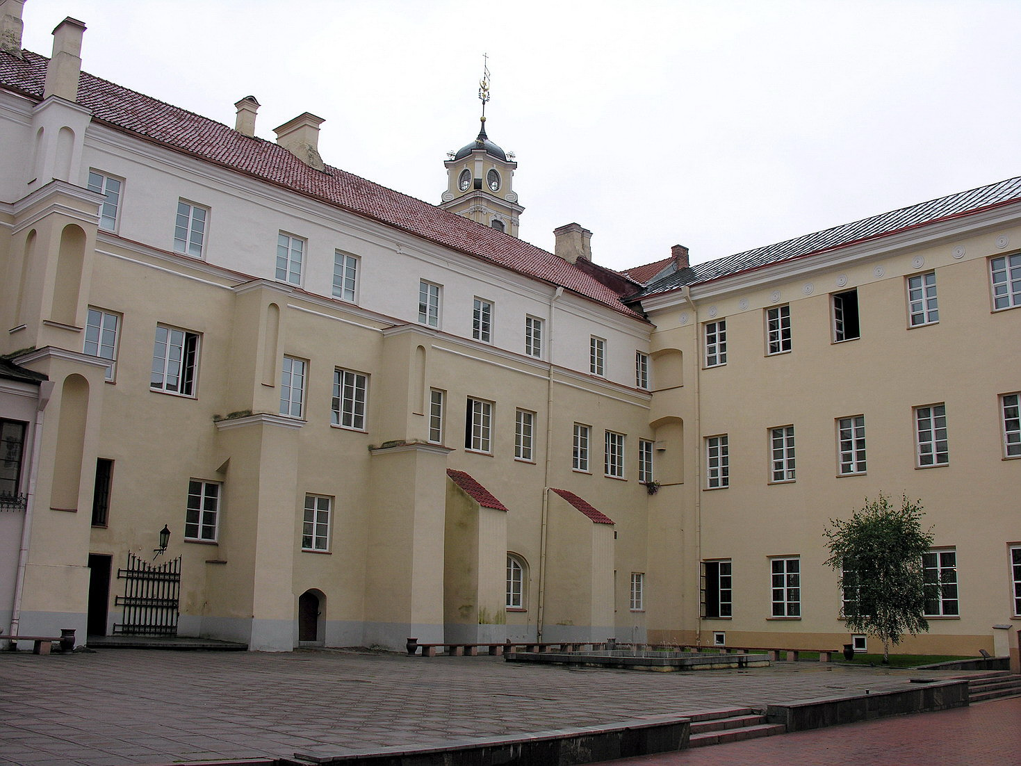 Vilniaus universiteto biblioteka iš Sarbievijaus kiemo pusės 2006 m. rugpjūčio 10 d.